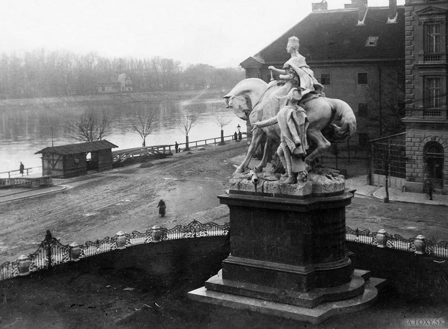 Záber na pamätník Márie Terézie z r. 1897.